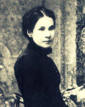 Maria Amália Vaz de Carvalho (1847 — 1921), escritora polígrafa e poetisa portuguesa